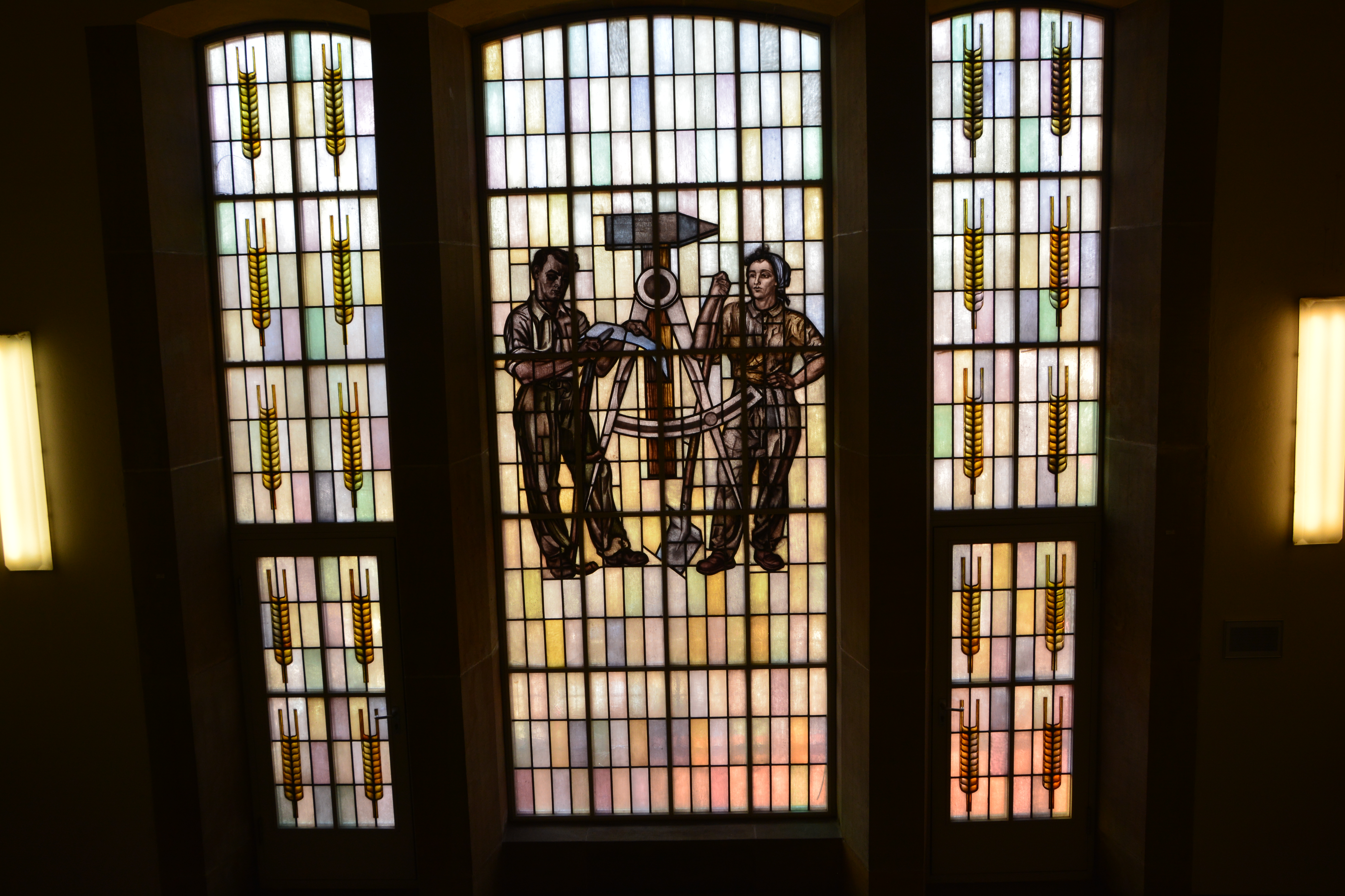 Dresden,TU-Gebäude am Weberplatz, Königliches Lehrerseminar - Arbeiter -und Bauernfakultät heute Erziehungswissenschaftliche Faklutät am Weberplatz. Treppenfenster Westflügel mit Glasmalerei Entwurf Willy Petzold. Gefertigt bei Oskar Fritz Beier, vormals Glaswerkstätten Beier& Walther, Dresden